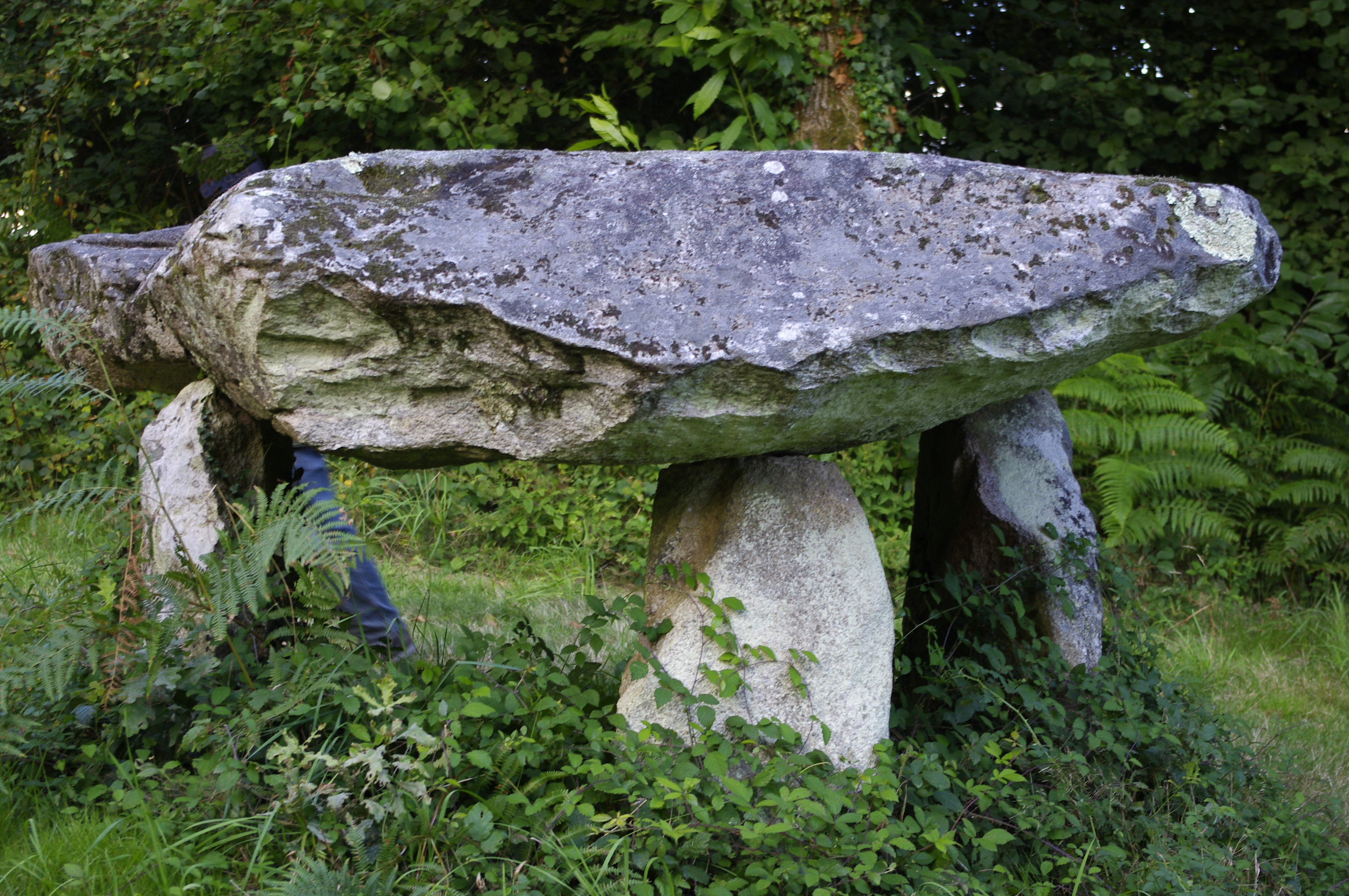 Dolmen de Rouffignac, commune de Javerdat, Haute Vienne